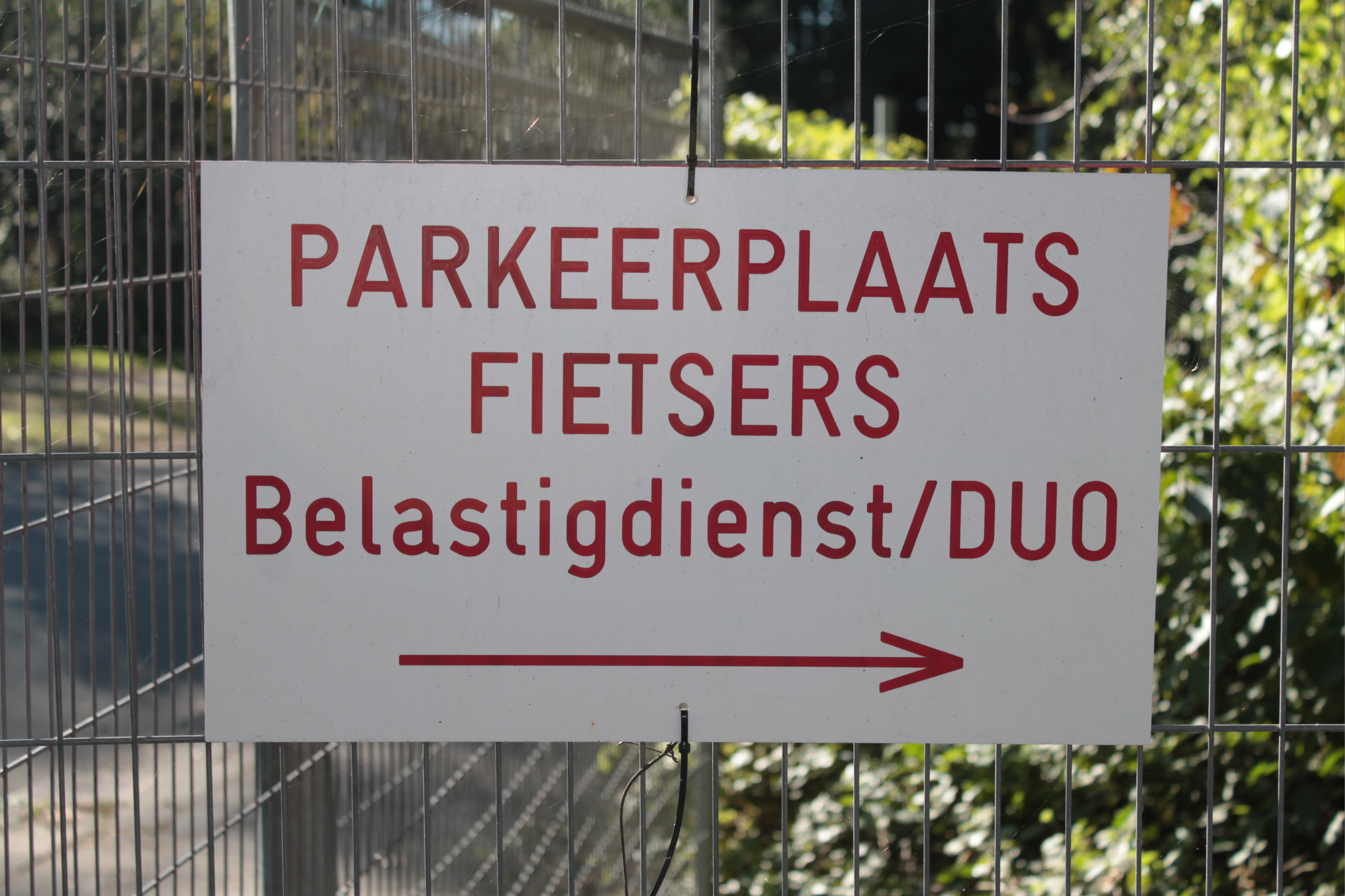 Ynformaasjebuordsje mei in bêste staveringsflater oan de súdeastrâne fan it terrein oan de Kempkensberg yn Grins, wer't it gebou fan de Belestingtsjinst en DUO stiet.